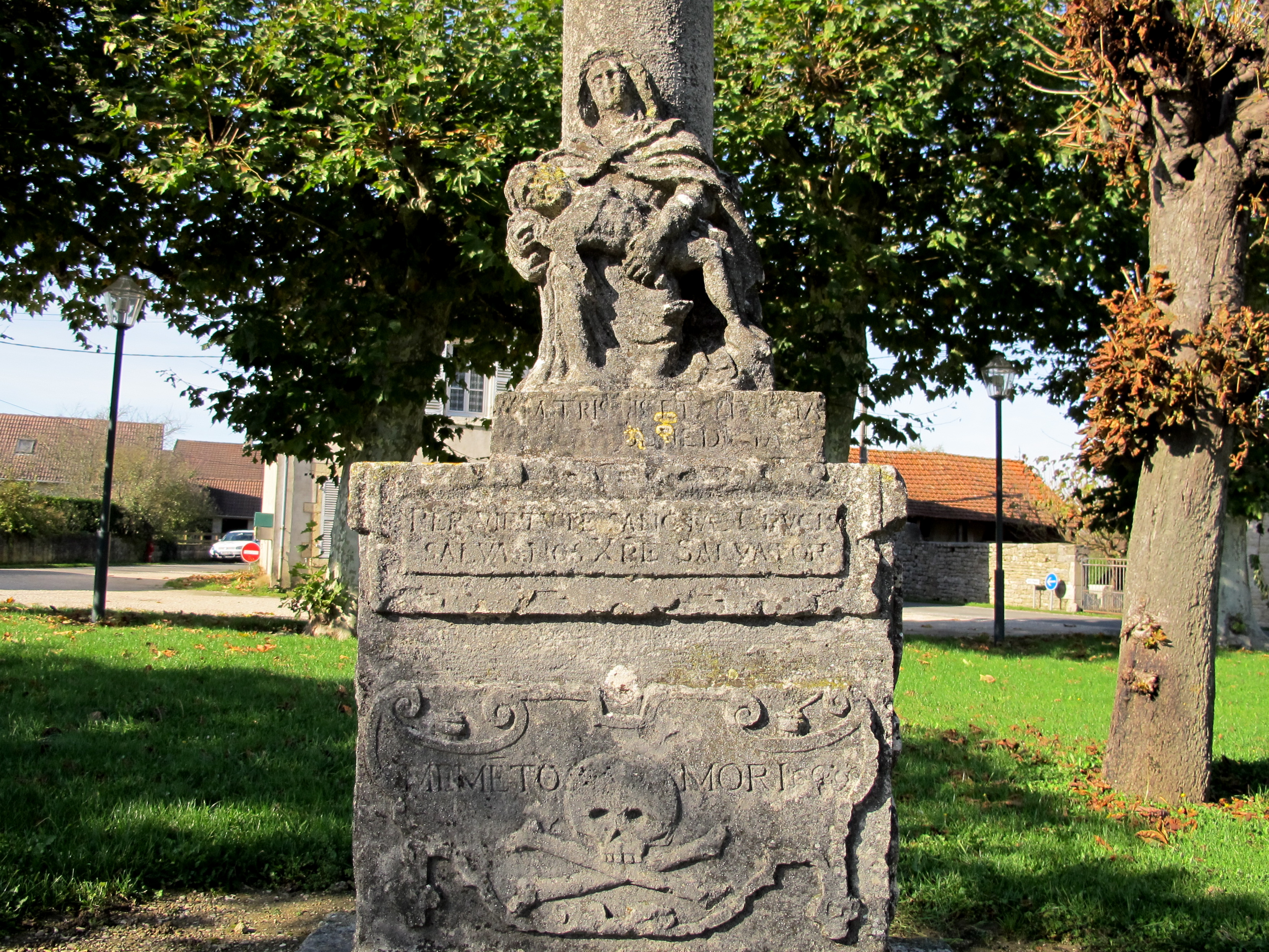 Petit Noir. Jura. Calvaire du XVIIe siècle face à l'église.